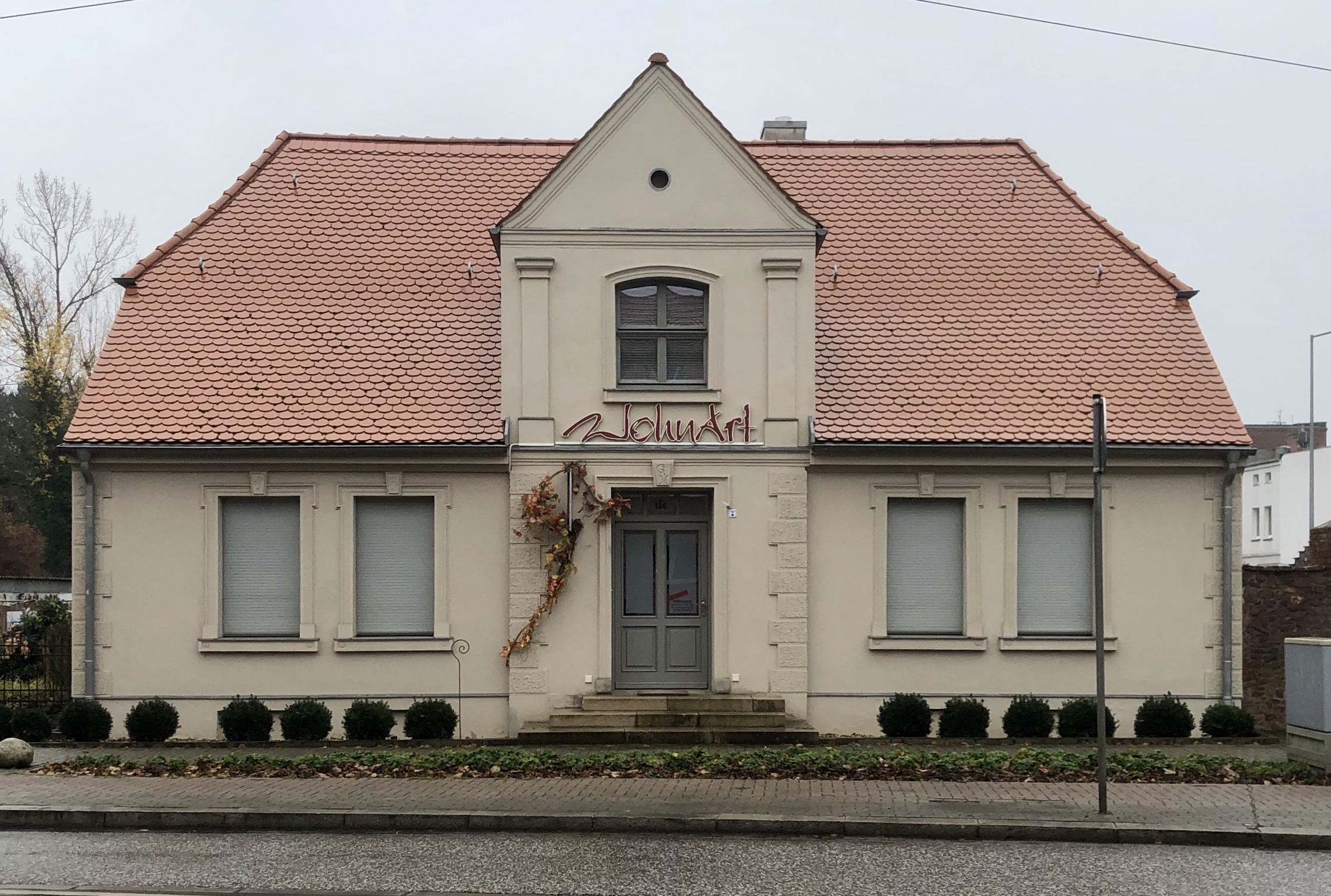 Große Diesdorfer Straße 126 Front